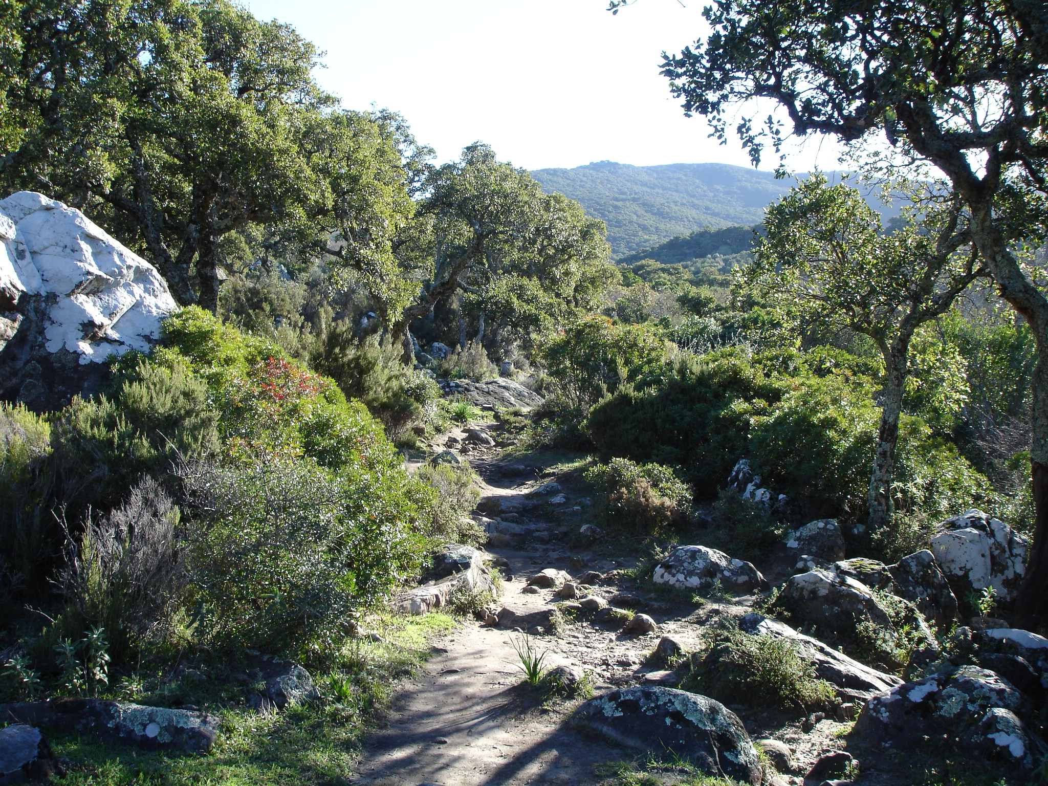 Camino de el Picacho y el Aljibe